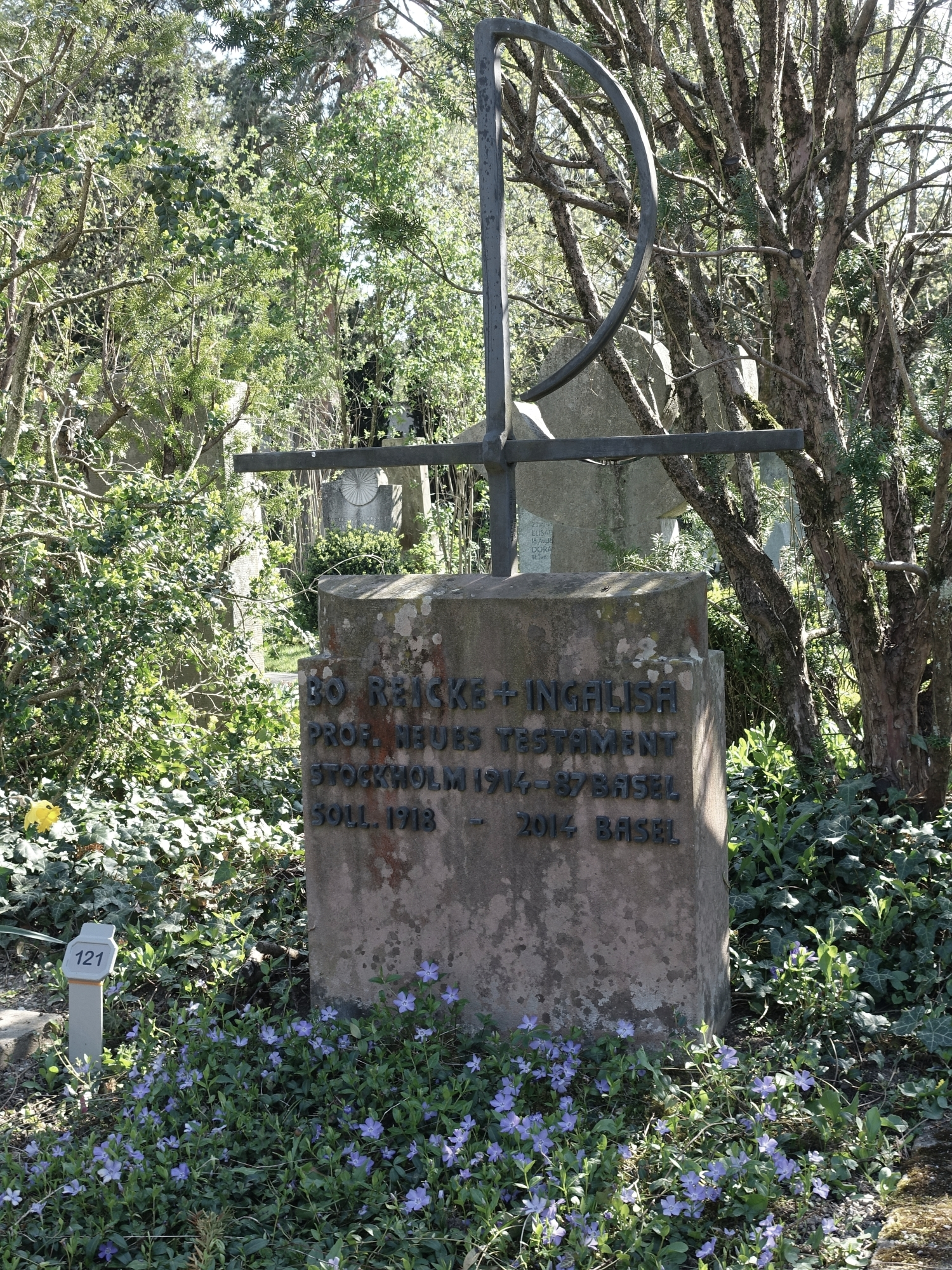 Bo Ivar Reicke (1914-2014), schwedischer evangelischer Theologe, Dozent und Neutestamentler.